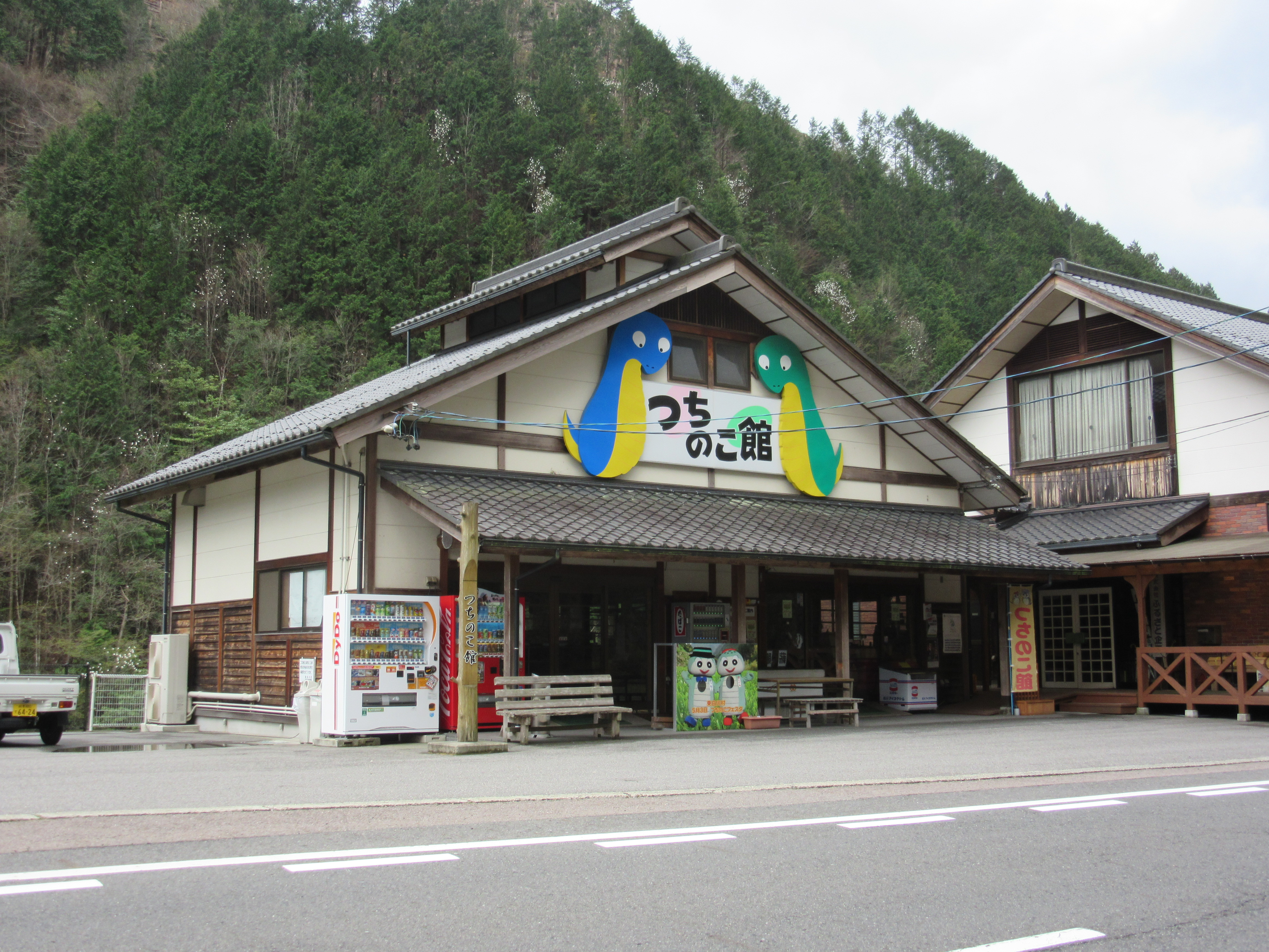 つちのこ館